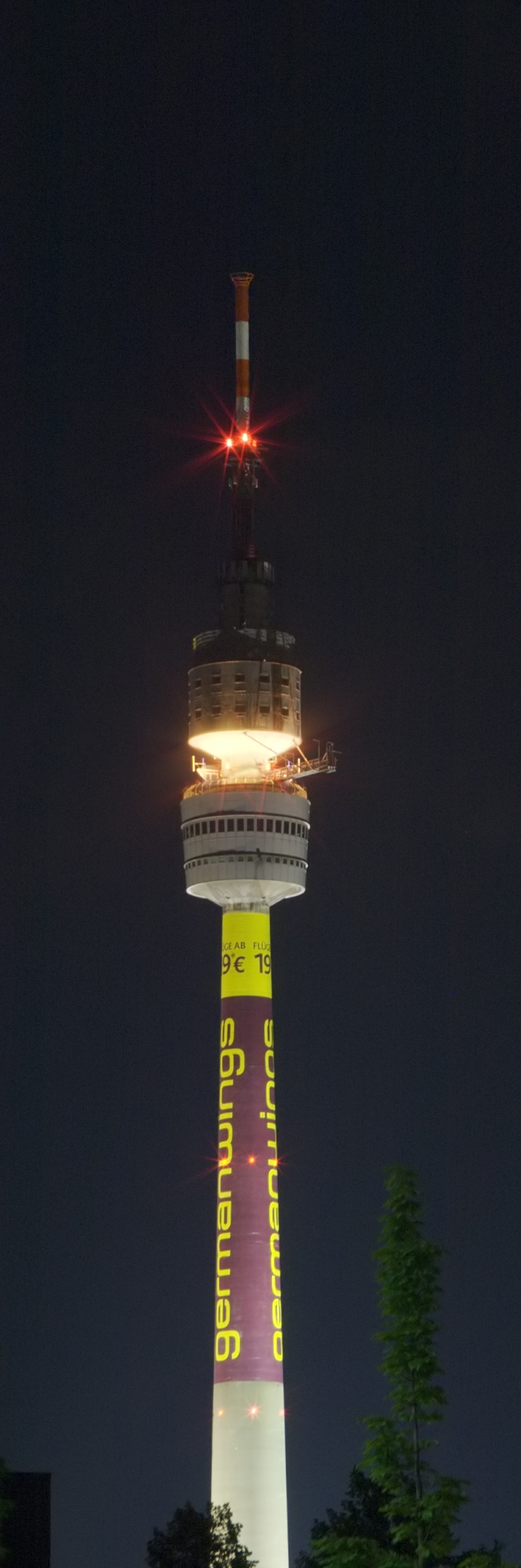 Der “Florian” in Dortmund, Nachtaufnahme